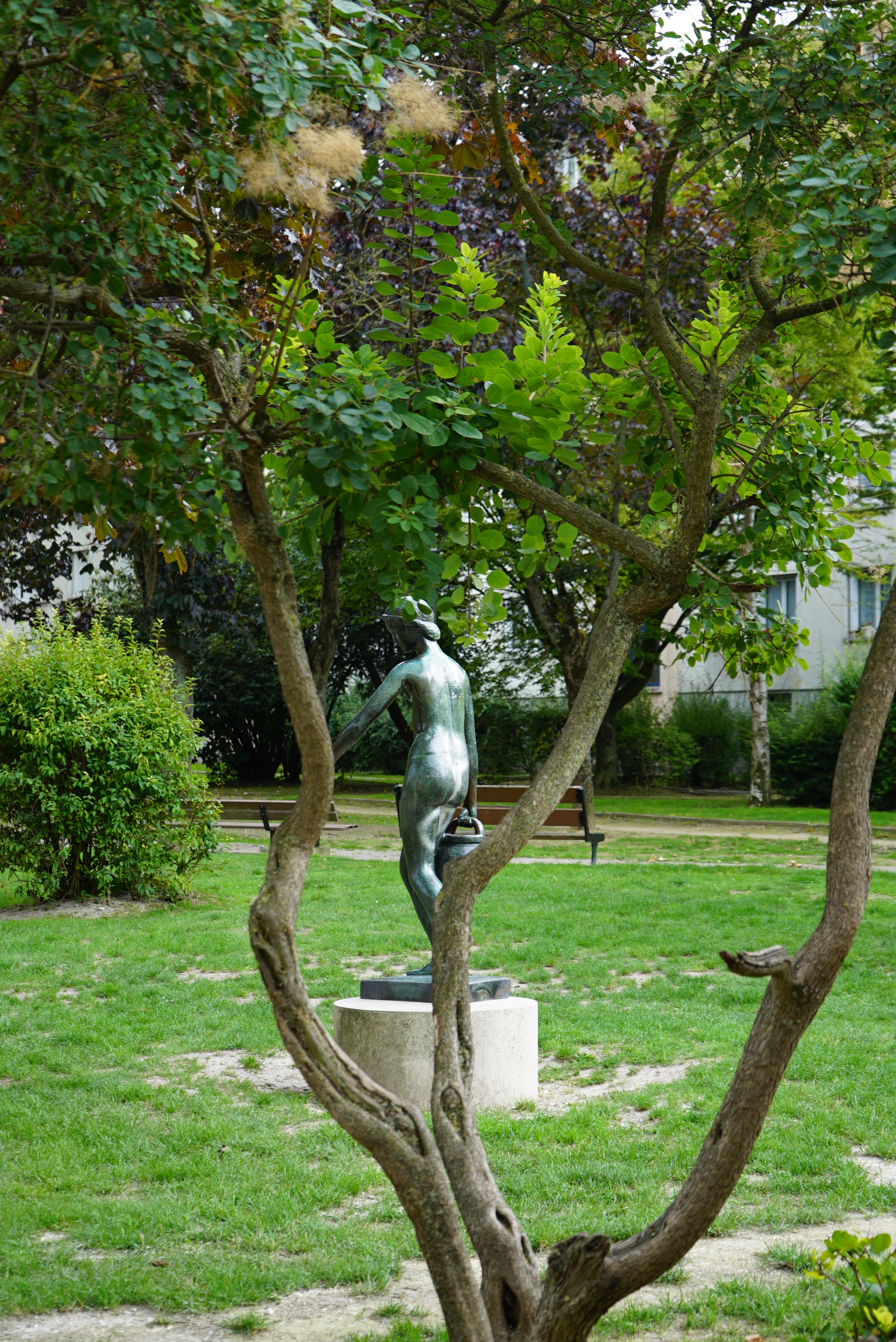 une vue du quartier Europe (Reims).